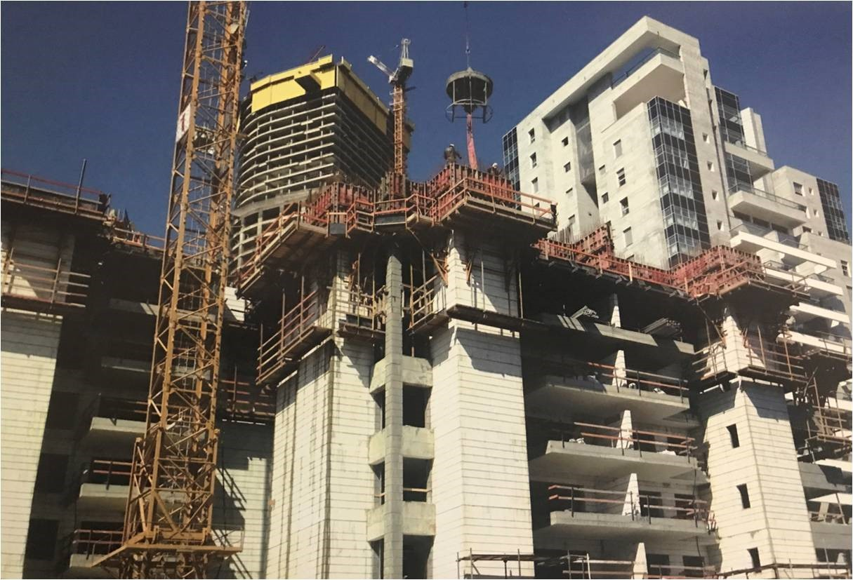 ברנוביץ - מערכת תבניות בבניין רב קומות